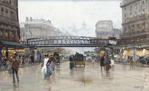 Boulevard de la Villette, near the Stalingrad métro station, Paris.